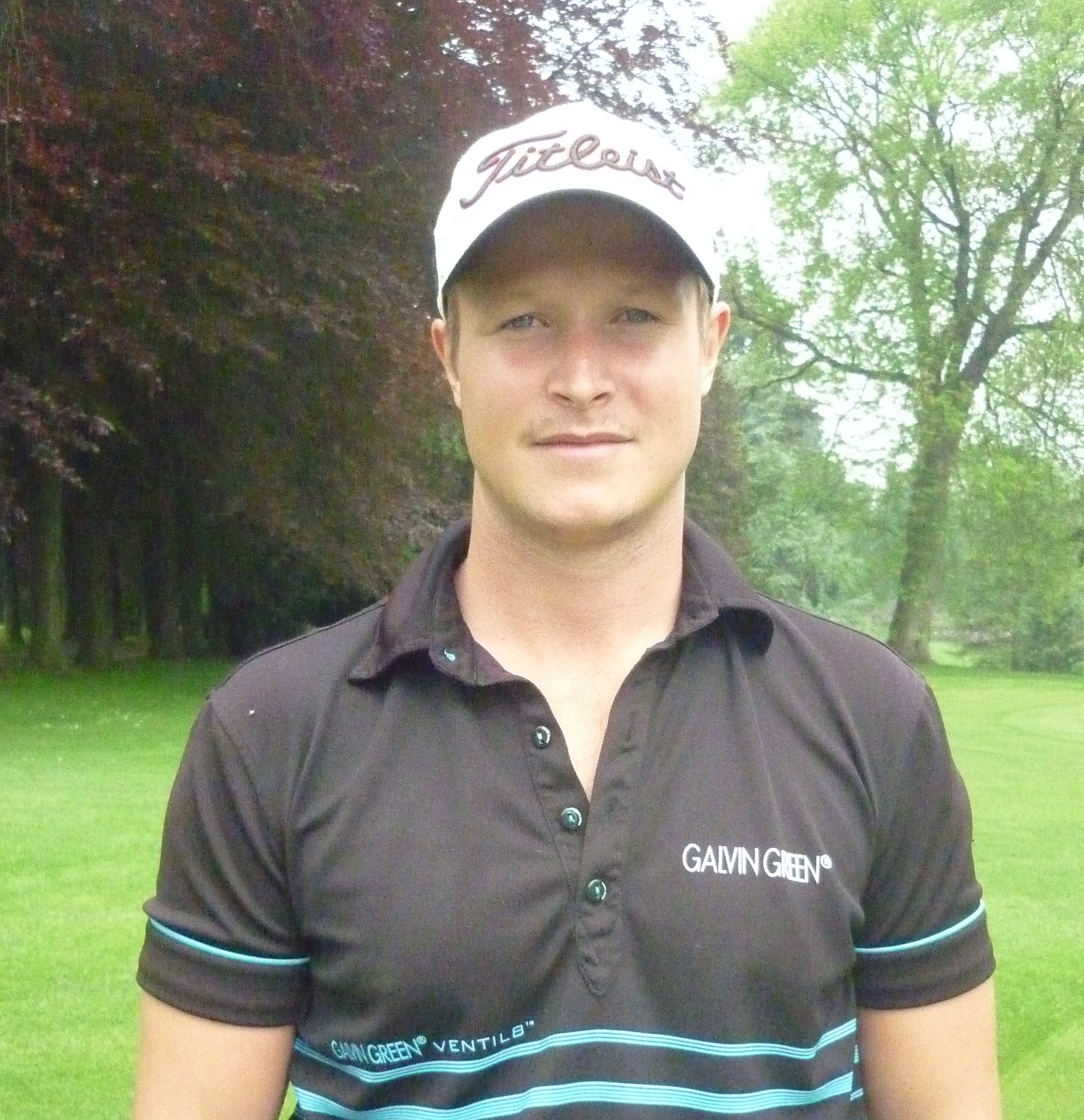 Björn Akesson op Ravestein voor de Telenet Trophy